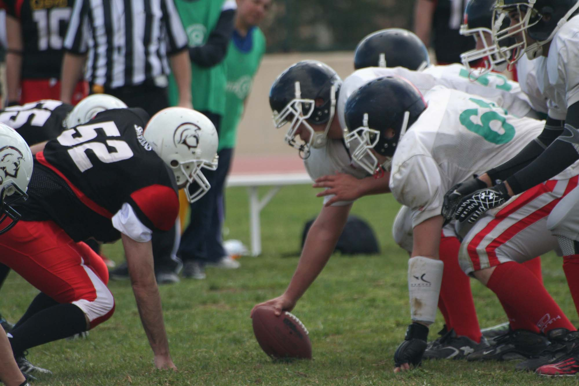 imagen tomada durante el partido Vinaroz IronMAns - La Nucia Spartasn